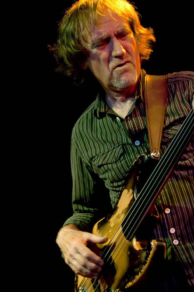 Koncert se skupinou T4 (Malostranská beseda, Praha)